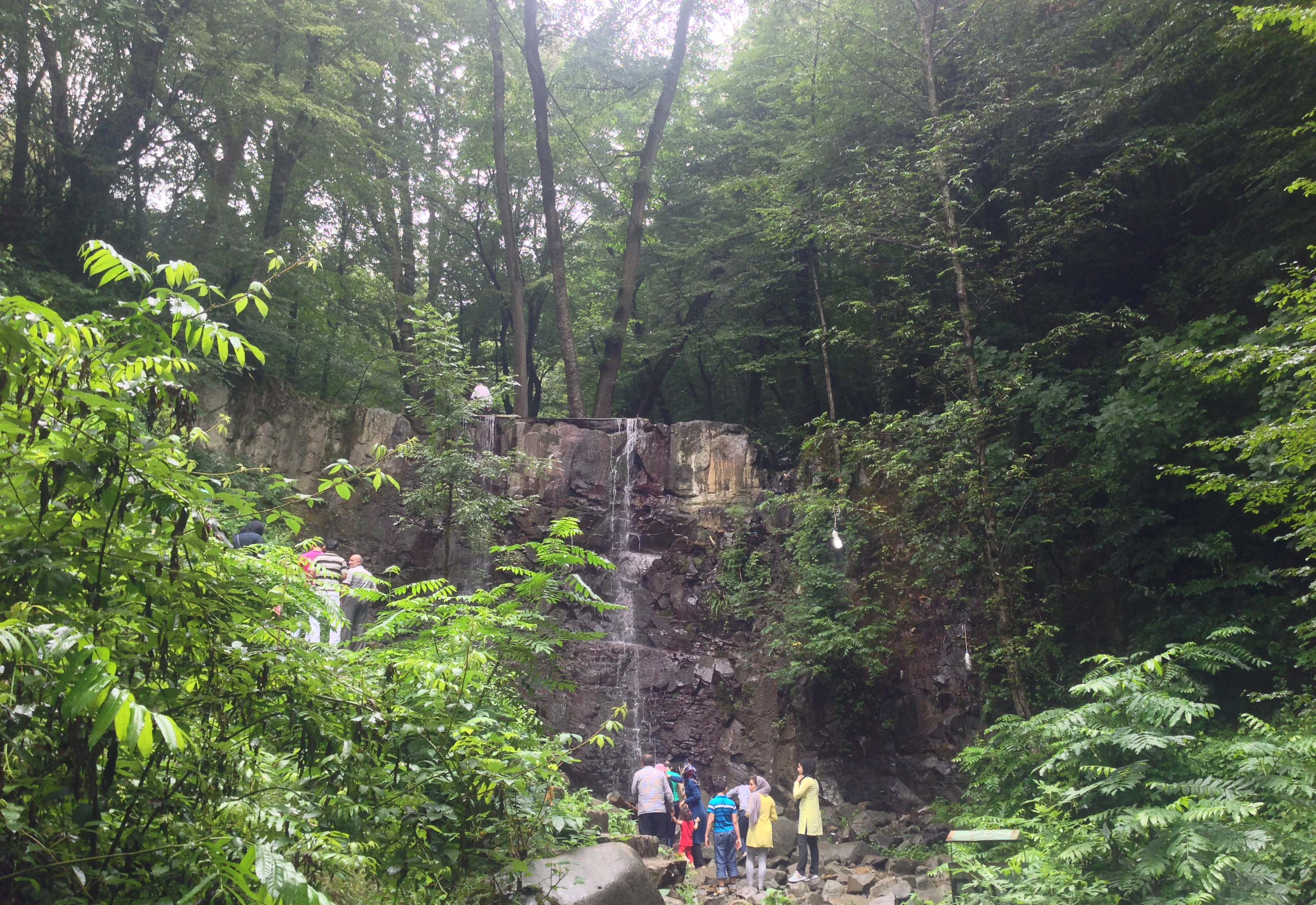 آبشار لونک، واقع در شهرستان سیاهکل